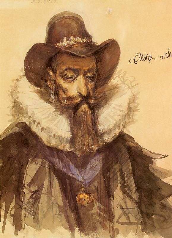 Zygmunt III Waza